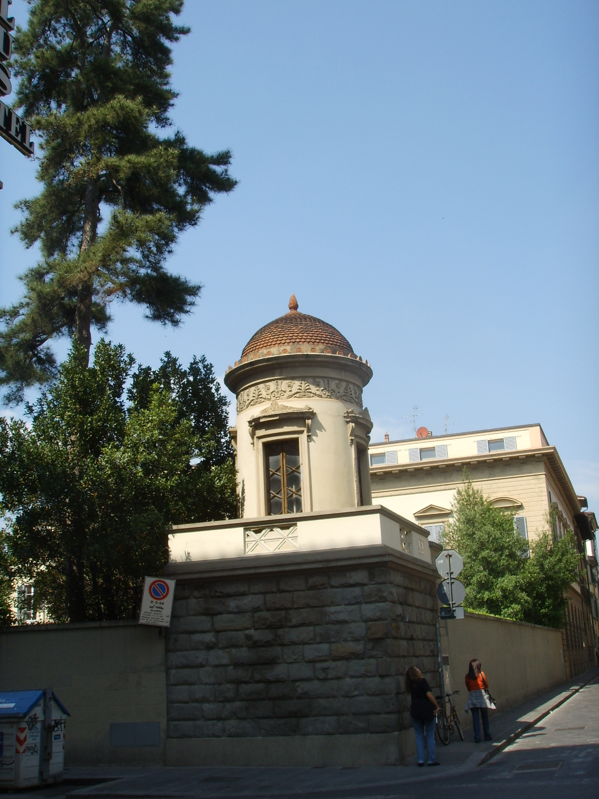 see description